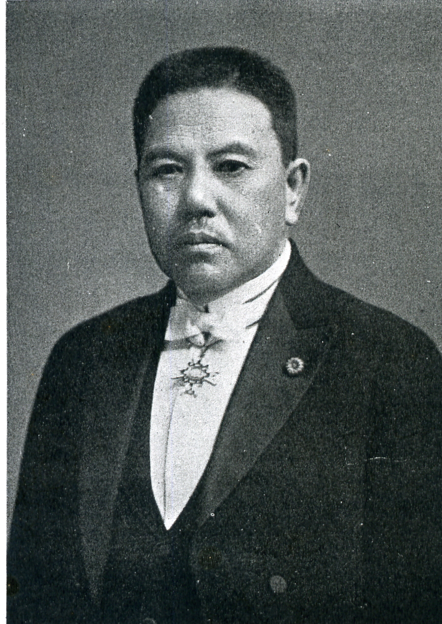 この写真は、向井倭雄（1872-1946）の写真です。